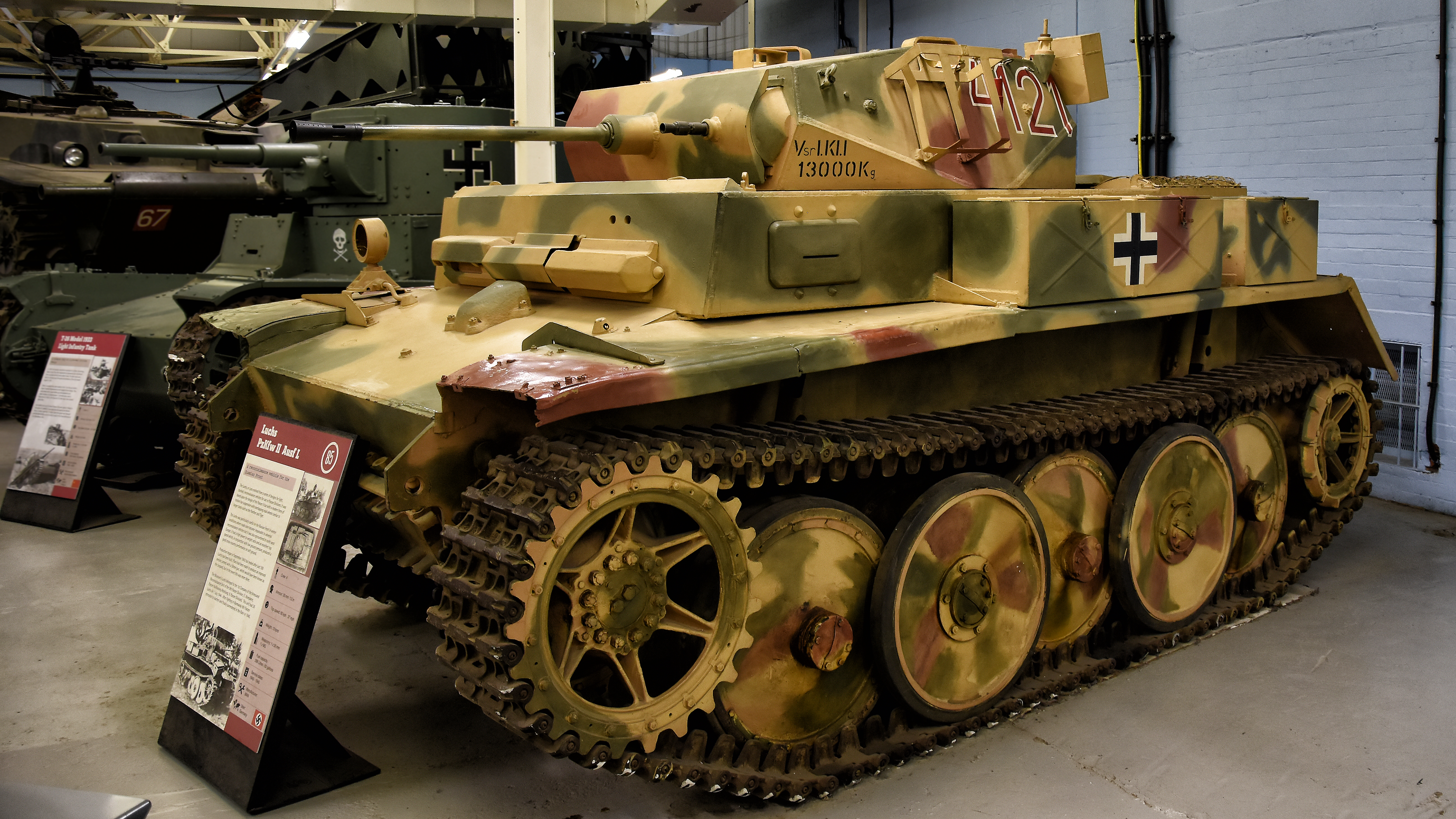 Panzer II Ausf. L (Luchs) in het Bovington Tank Museum